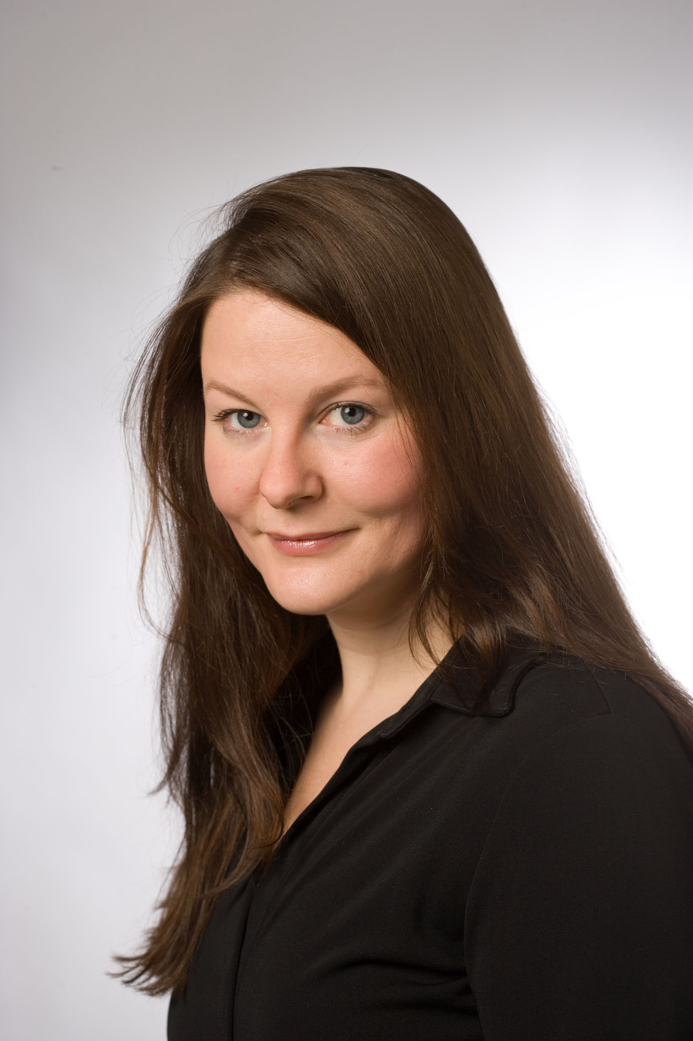 österreichische Nationalratsabgeordnete